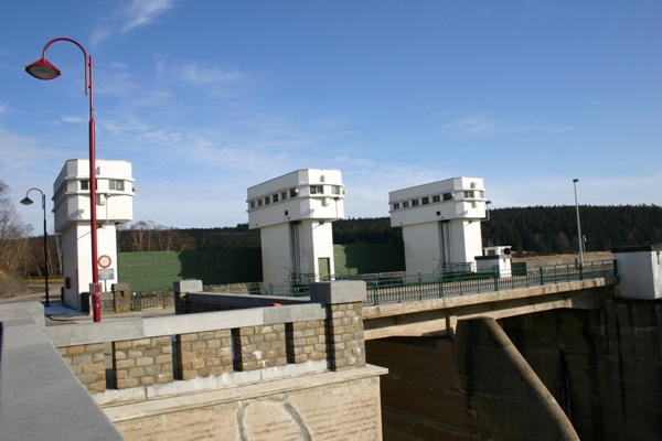 Manövergebaier vun de Schleisen